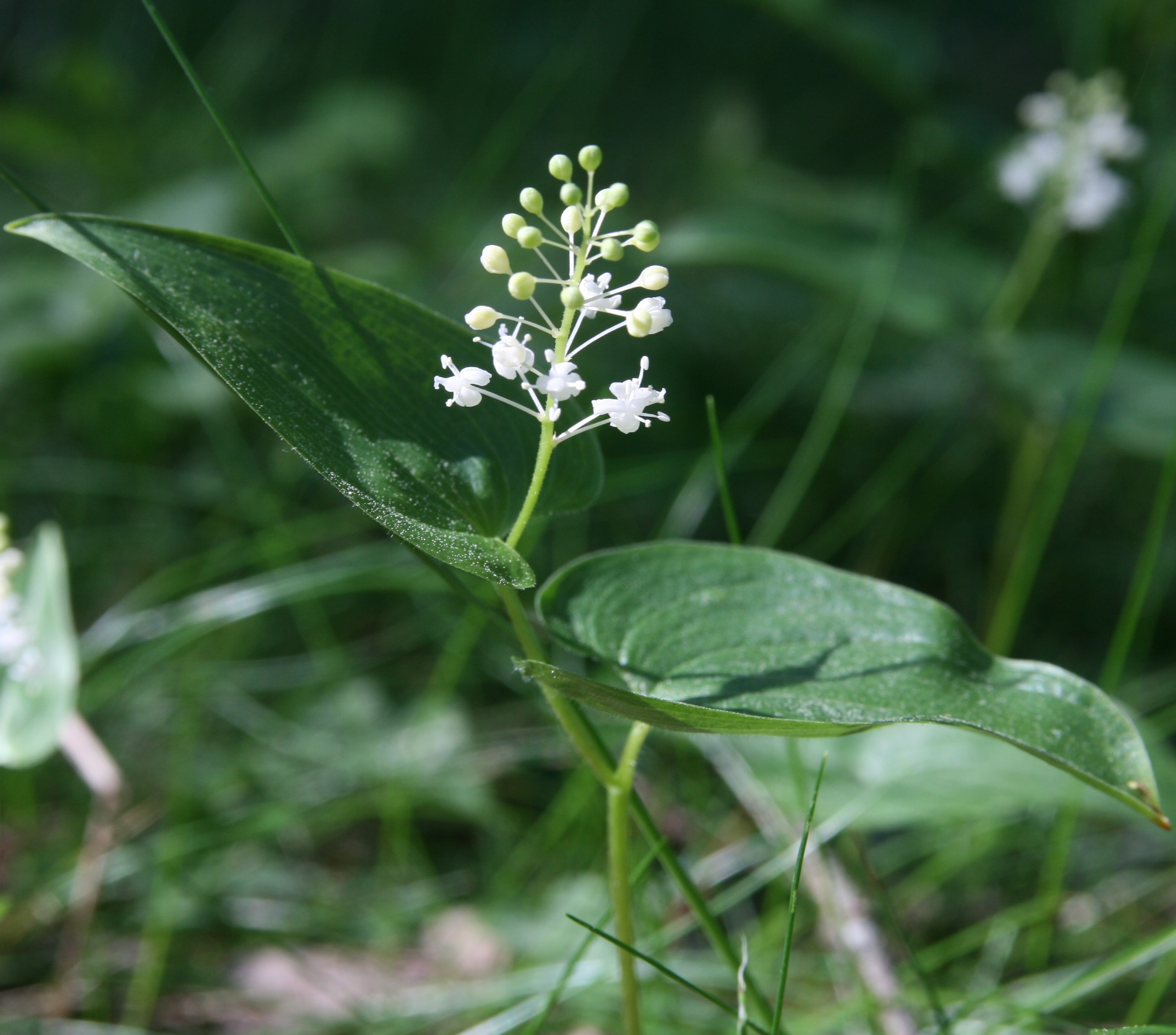 Oravanmarja, Maianthemum bifolium